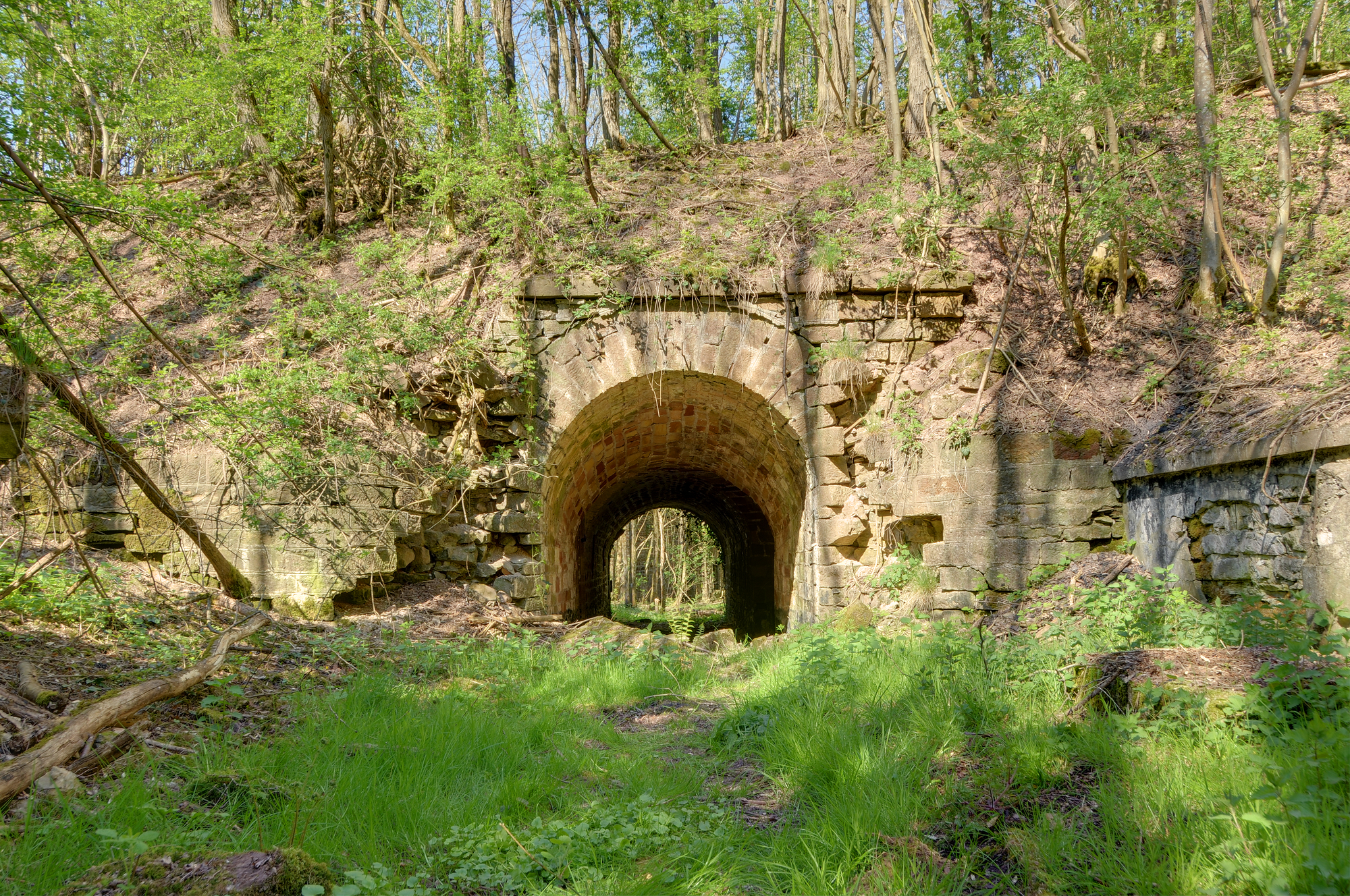 Dans la rue des remparts.. . Roppe fortifications (HDR).